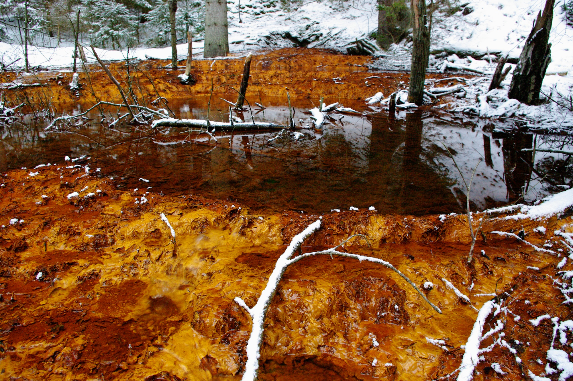 Malenický pramen v zimě